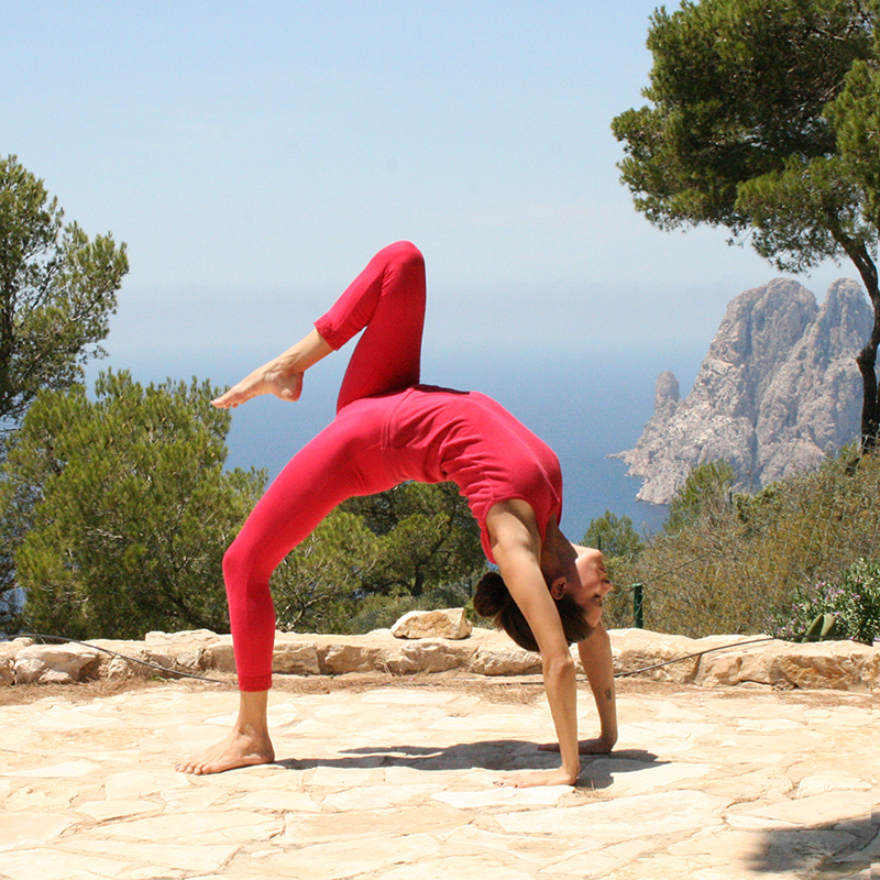 Eka Pada Chakrasana by Nina Mel, Yoga Teacher